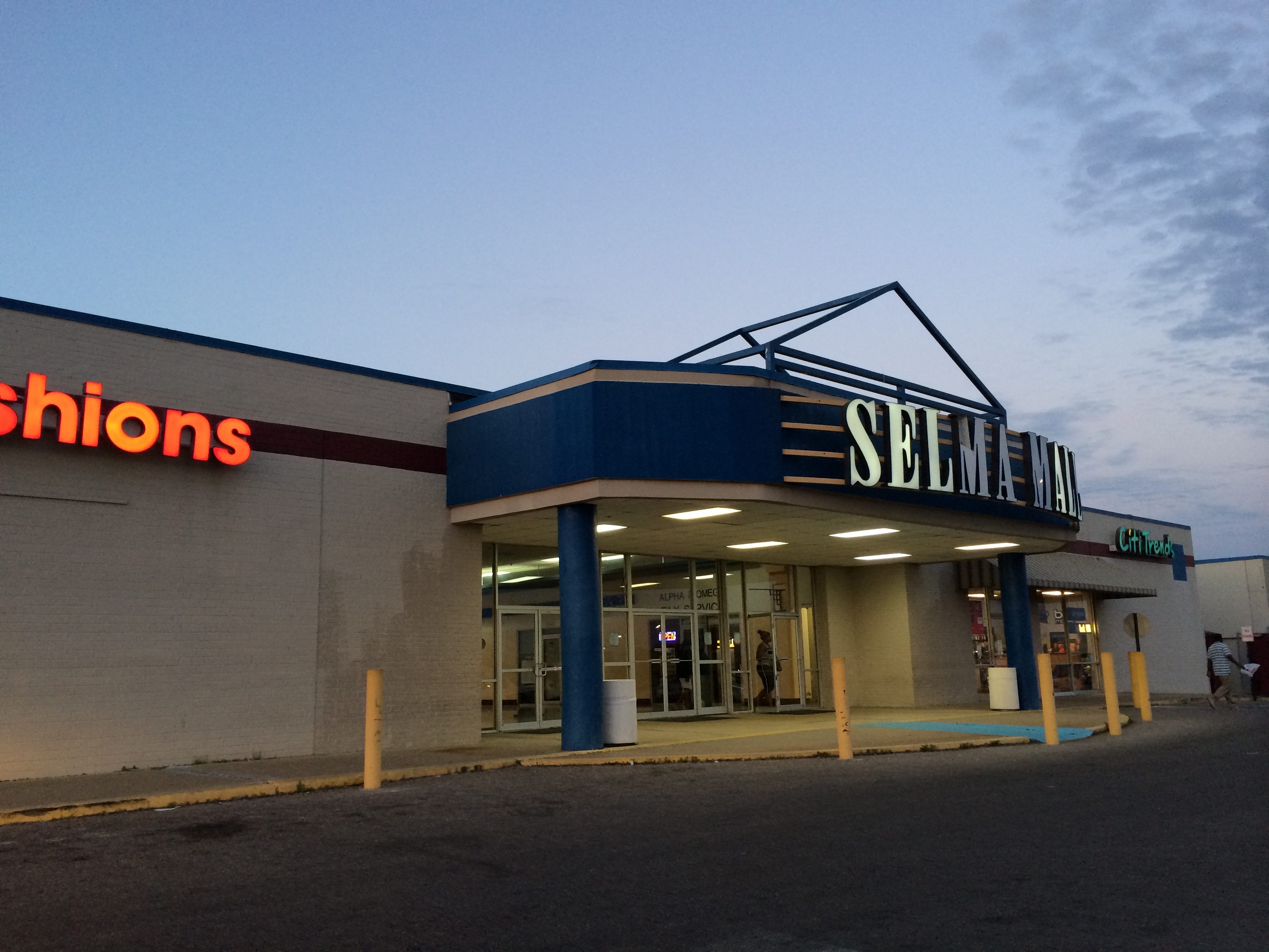 Selma Mall